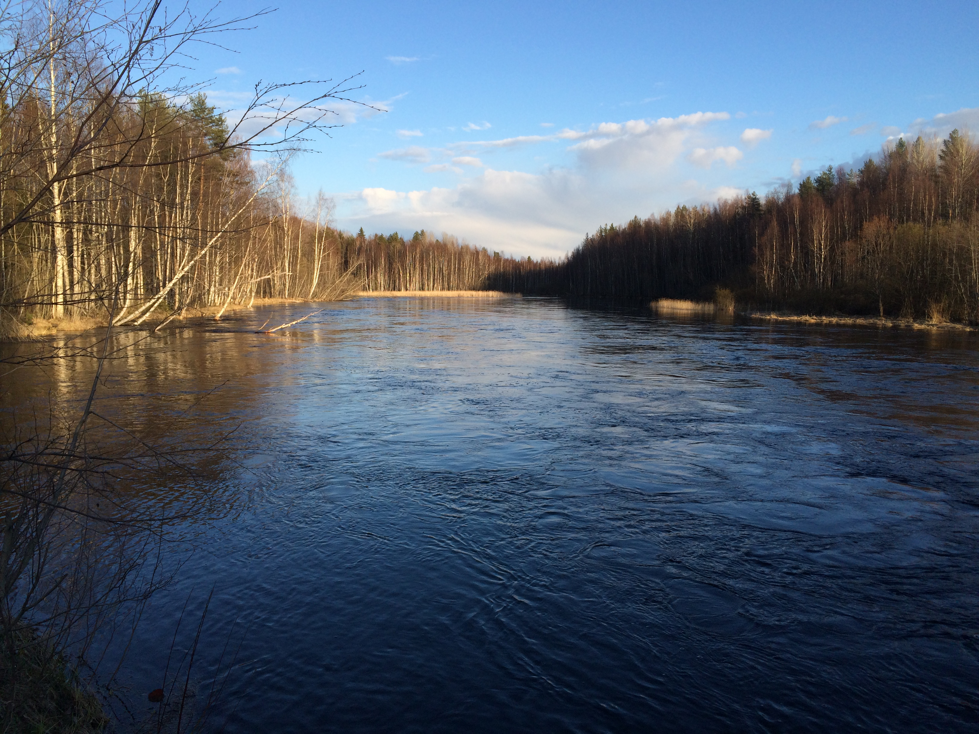 р. Нива (Кондопожский район)